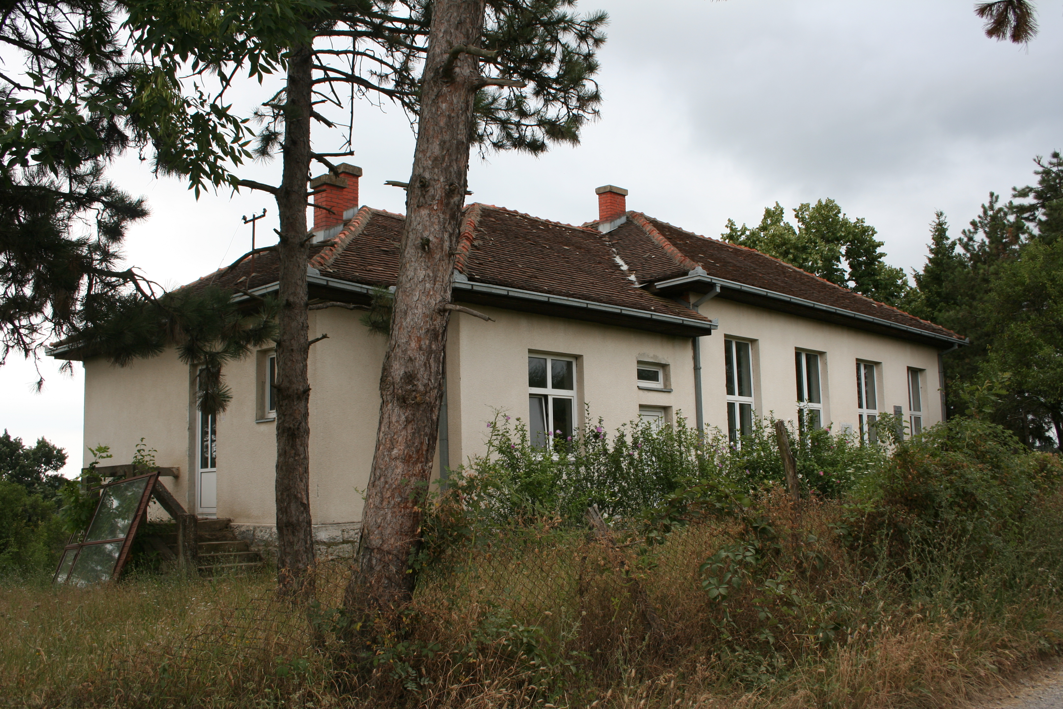 Zgrada škole, Zukve